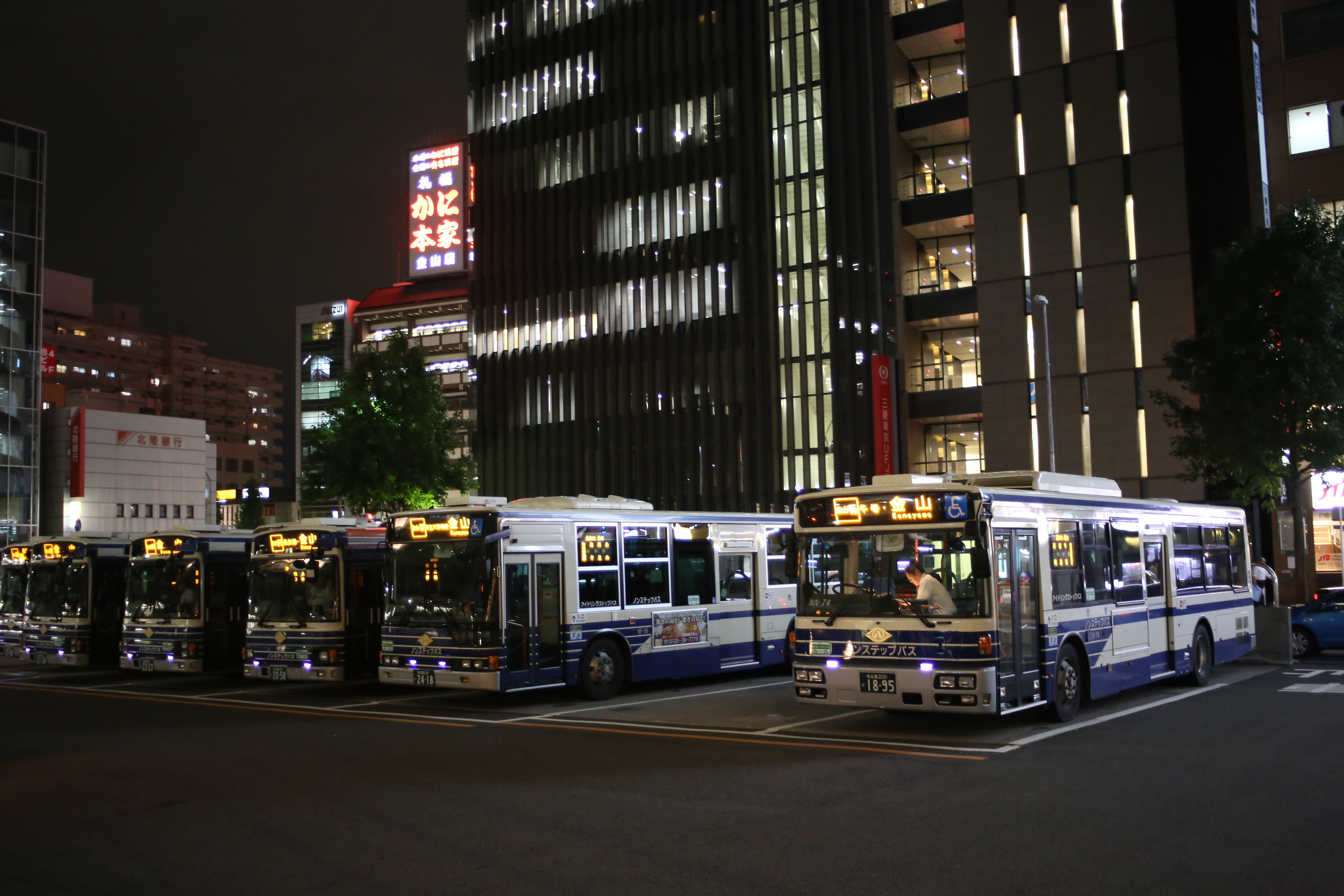 名古屋市中区金山一丁目のアスナル金山のバスターミナルを南西側より撮影